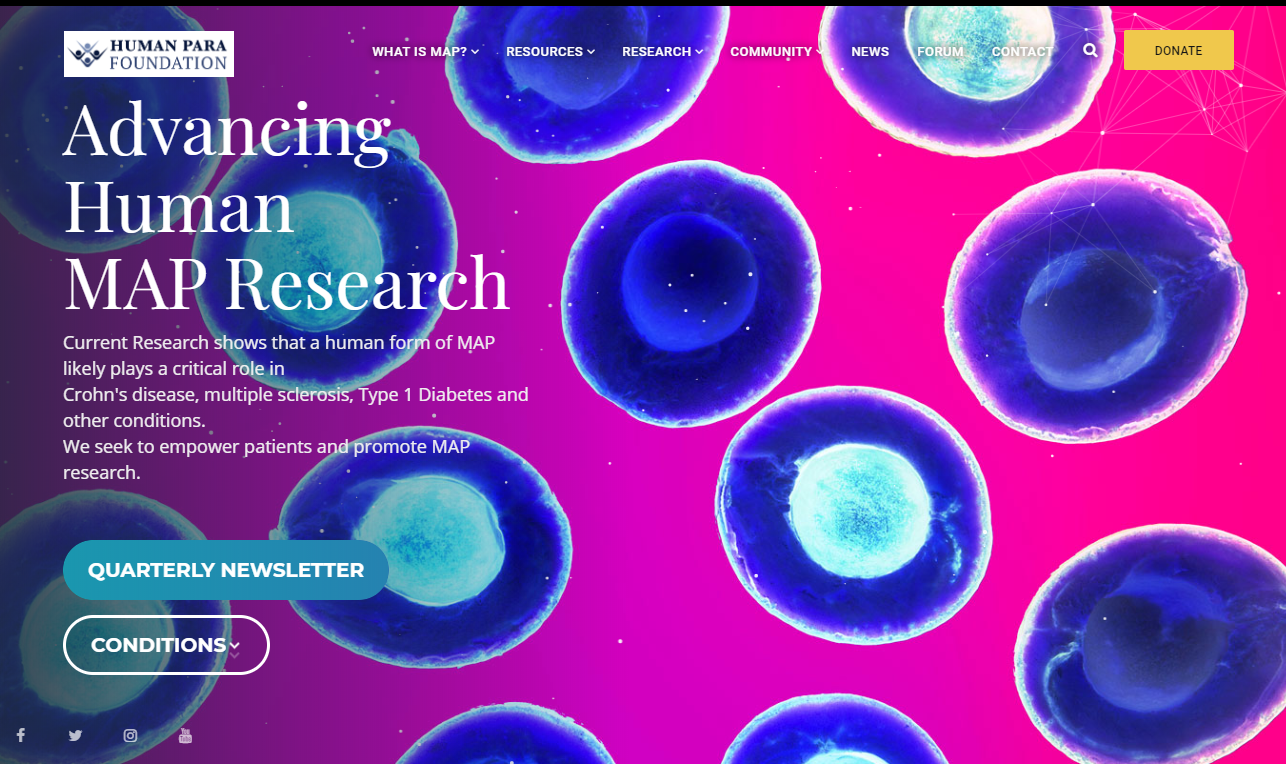 アメリカの人ヨーネ病財団